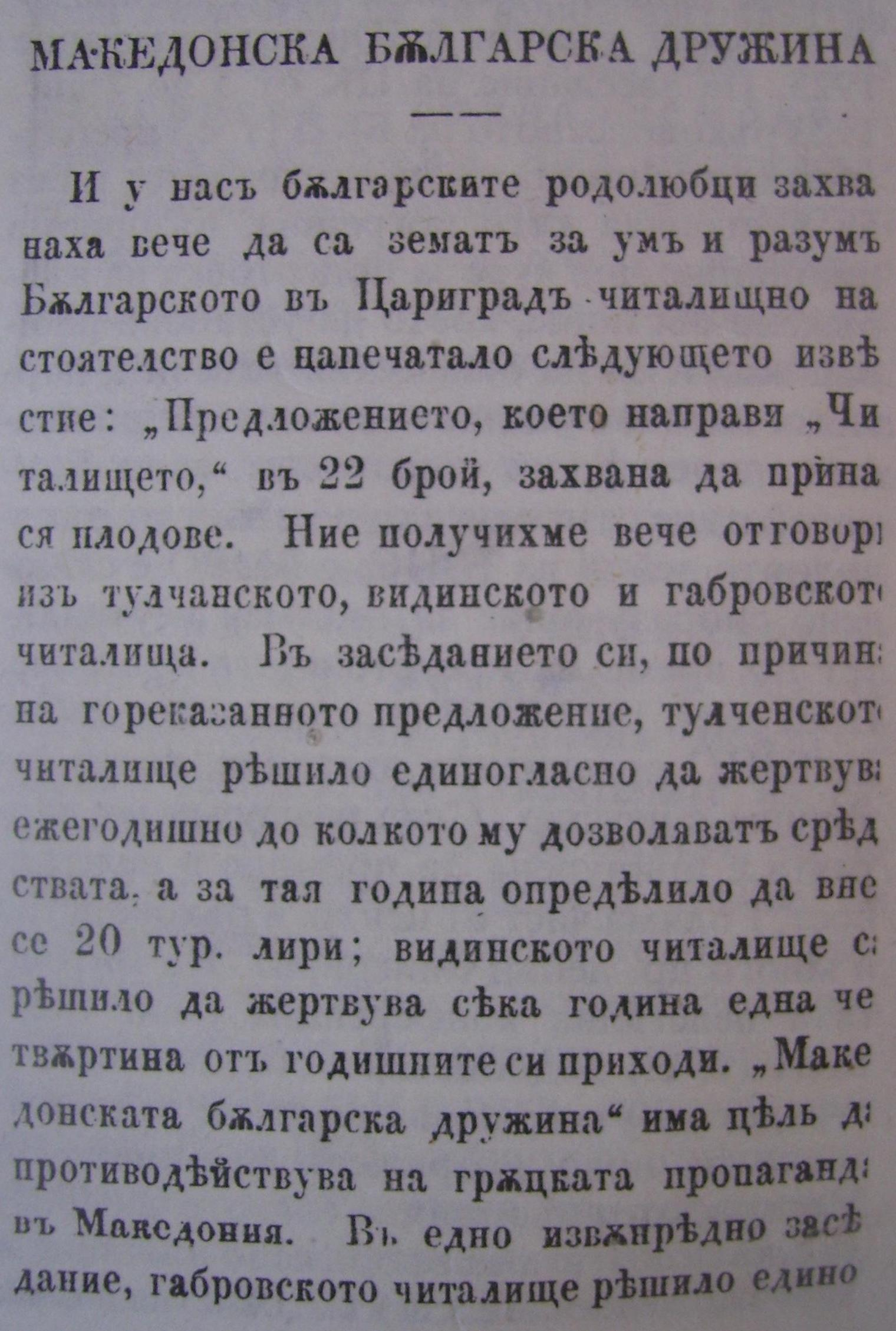 Дописка във вестник "Свобода" по повод основаването на Македонската българска дружина.